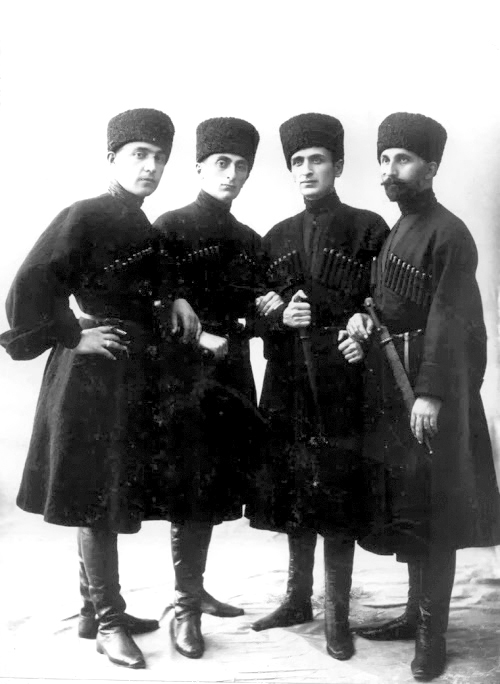 Носители чёрных чох Павел Ингороква, К. Гамсахурдия, В. Котетишвили и А. Абашели